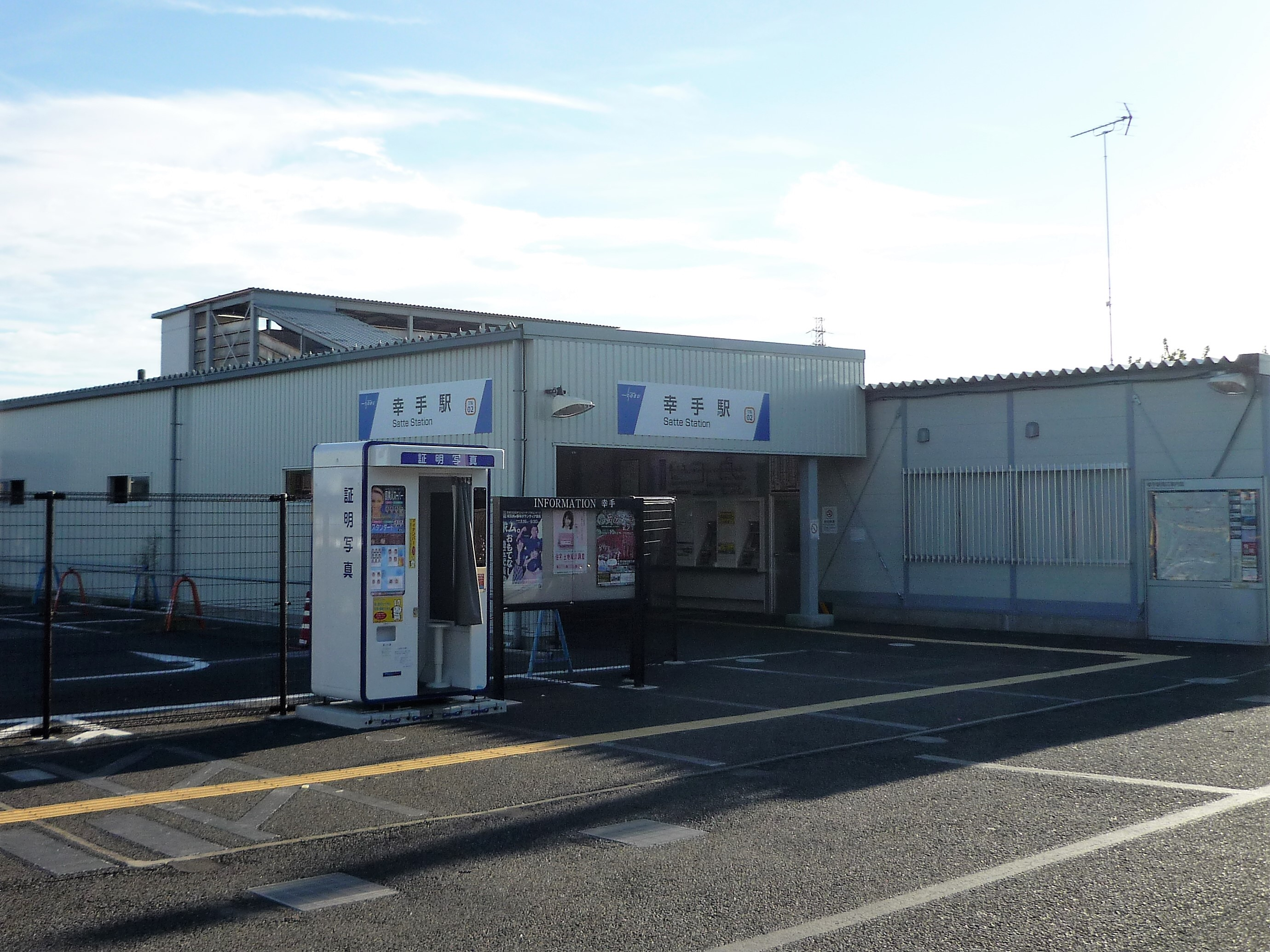 幸手駅（橋上化工事に伴い設置された仮設駅舎、2018年9月撮影） Panasonic Lumix DMC-FS3